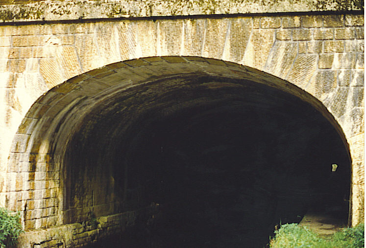 propre photo